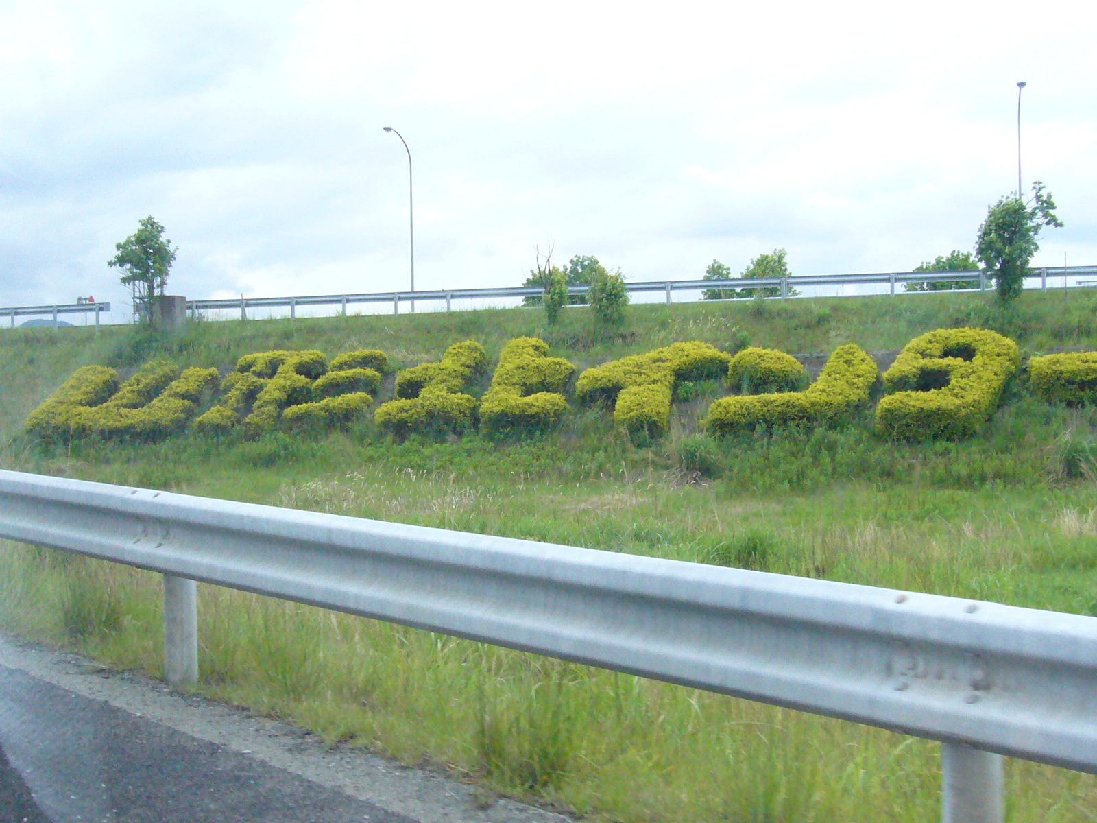 yamagata-kita-IC,yamagata-expressway,yamagata-city,japan.JPG